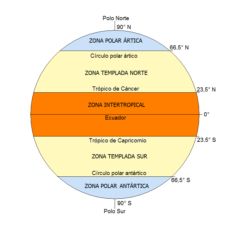 Diagrama del planeta Tierra mostrando los paralelos notables y las zonas geoastronómicas climáticas que estos limitan.